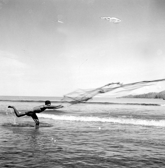 Negatief. Visser die zijn net uitwerpt, Celebes